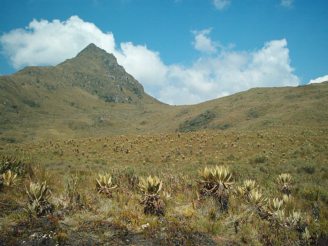 Pico Everest en el Páramo del Meridiano, análogo en forma al Monte Everest. La naturaleza ha dotado nuestra Región con este hermoso émulo. Herrera, Tolima, Colombia